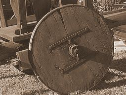 Altes Holzrad